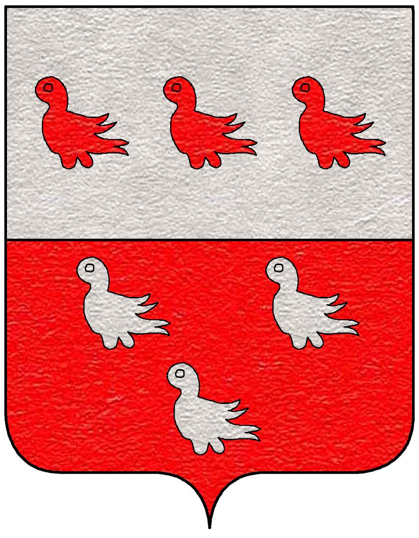 Stemma della famiglia Sanfelice